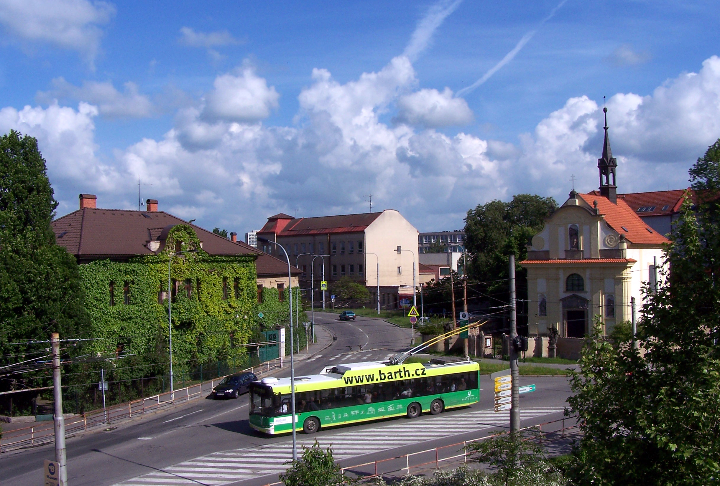 Kostel Panny Marie Bolestné (Pardubice)